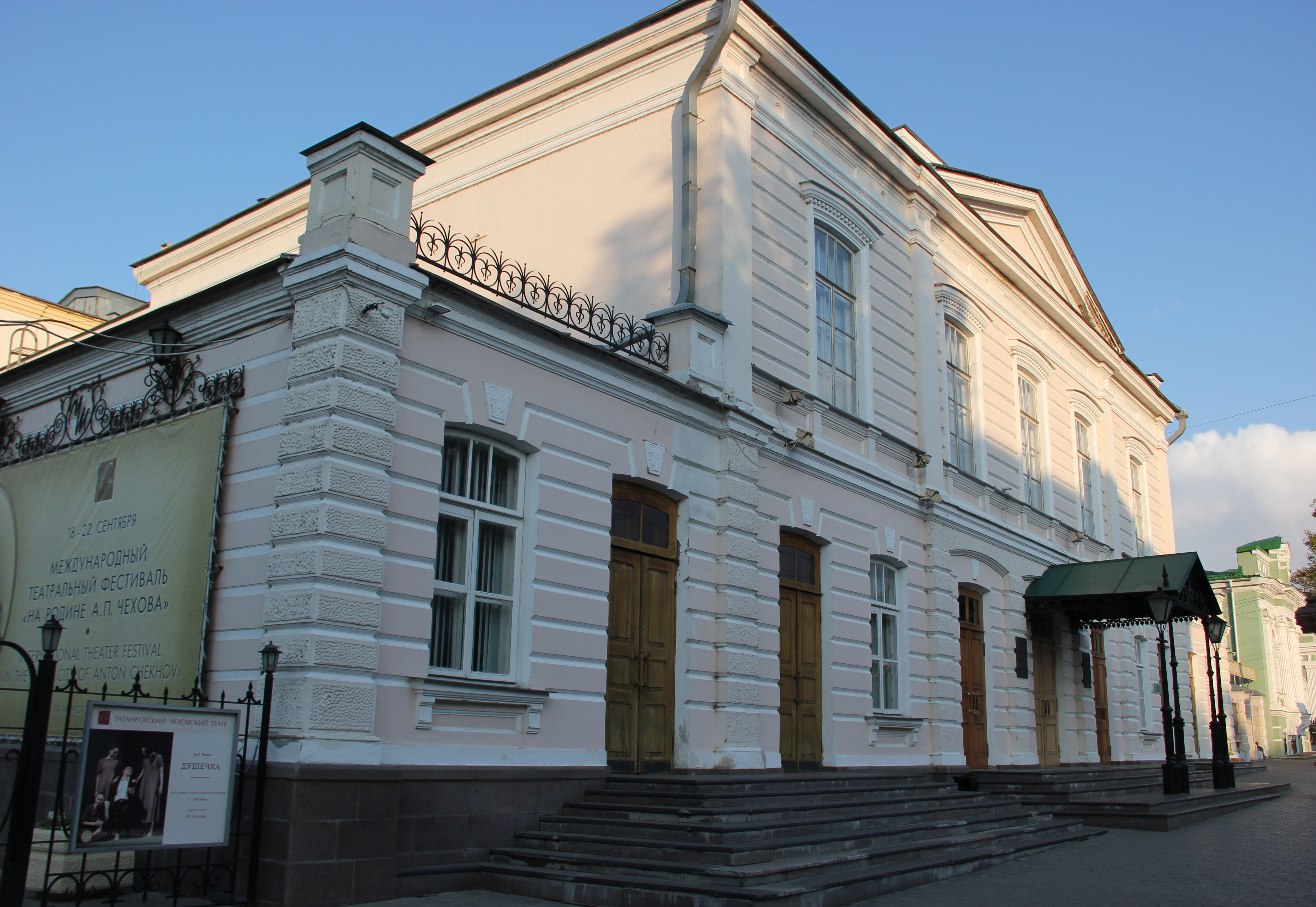 В здании театра неоднократно бывал А.П. Чехов. Один из старейших театров на юге России.